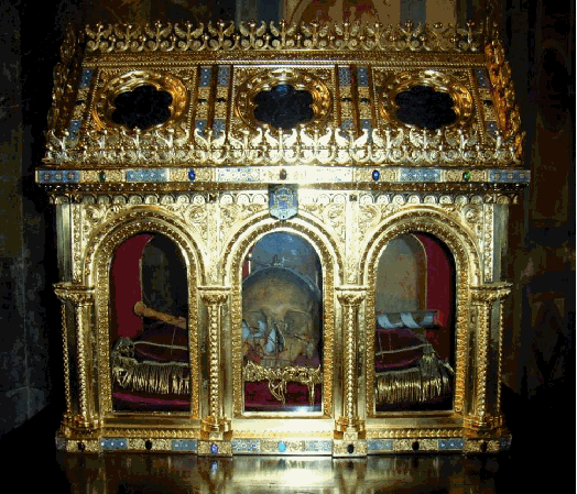 Chasse de Saint-Lazare, avec les hypothétiques reliques de Saint-Lazare (la tête et quelques ossements) à la cathédrale de Marseille